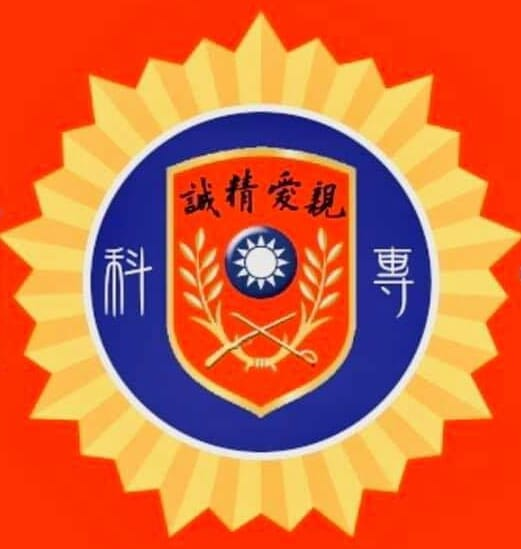 拍攝專科班會員大會"會徽"照片~陸軍官校專科班校友會-會徽~(親愛精誠-由右至左 正確版)